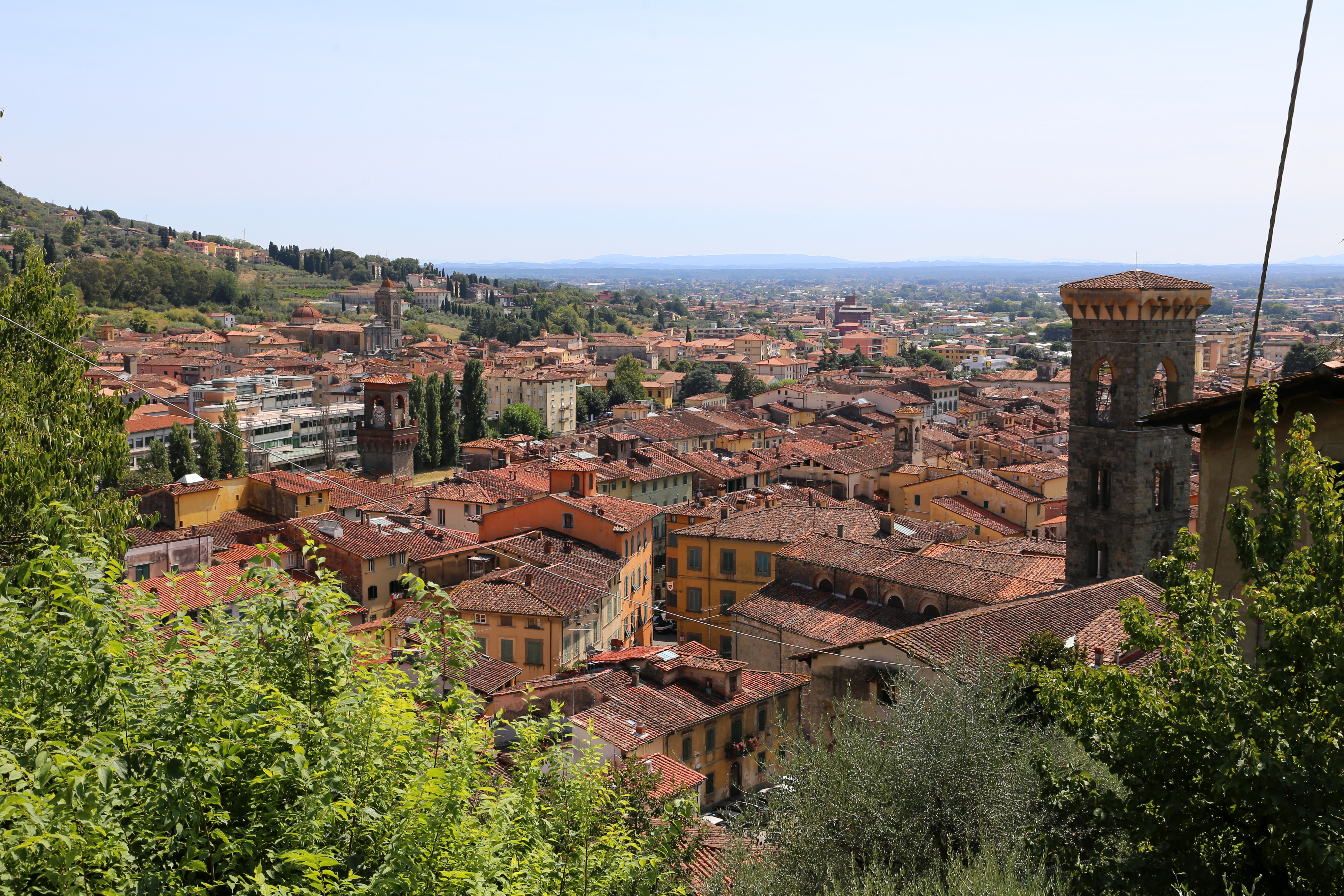 Mura di Pescia This is a photo of a monument which is part of cultural heritage of Italy.